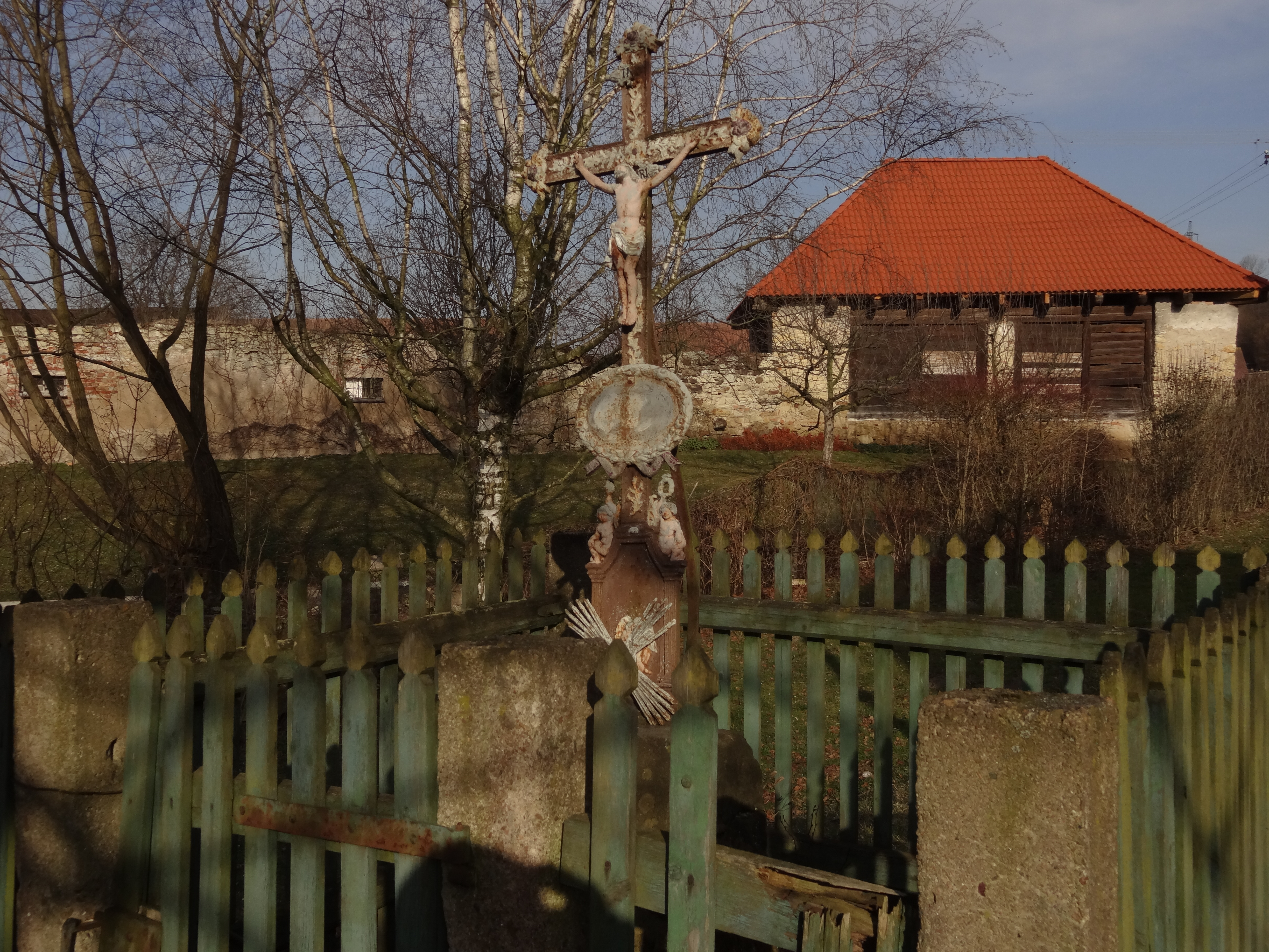 Chuchel - křížek